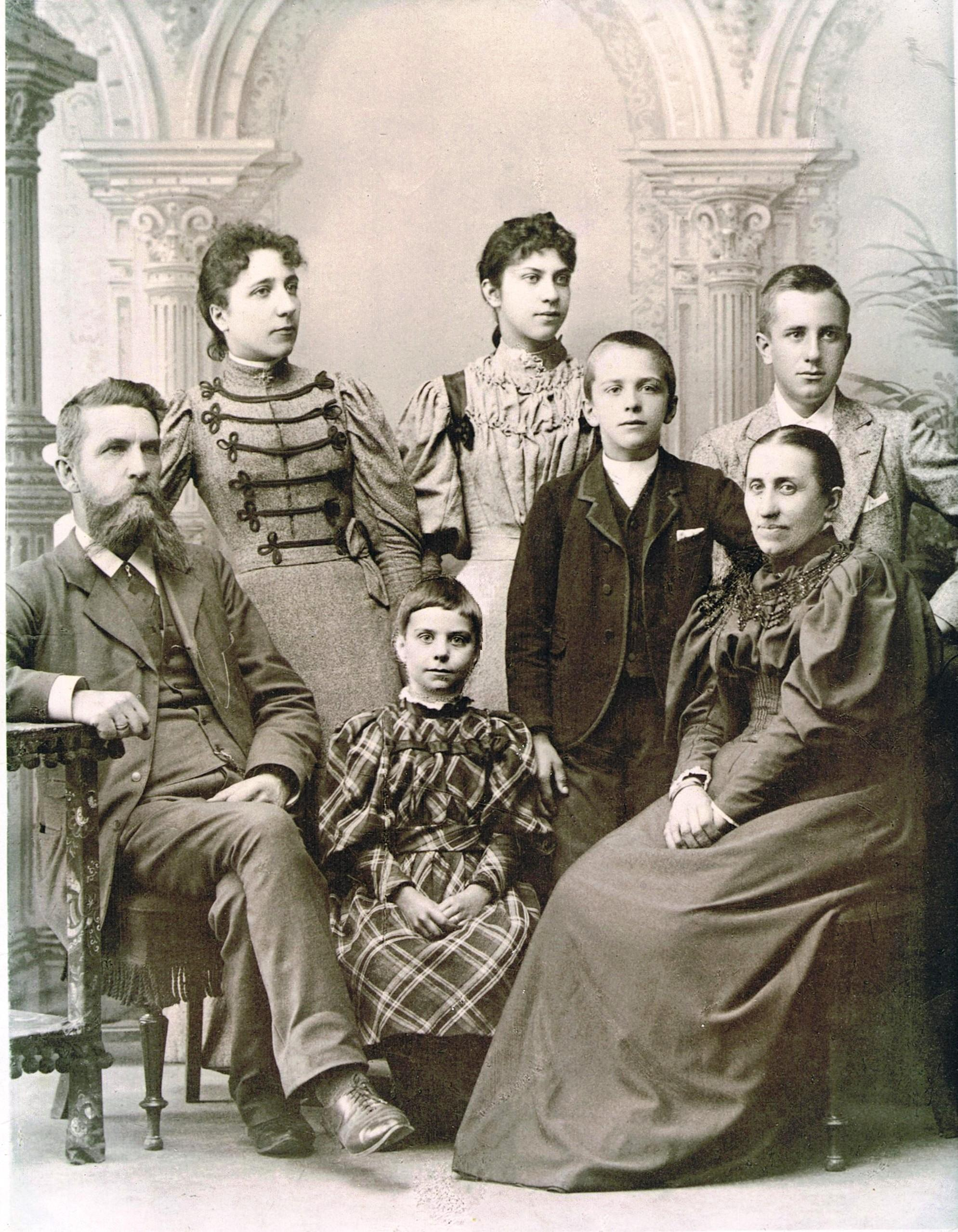 Familien Halvorsen og Hassel i Hamar.